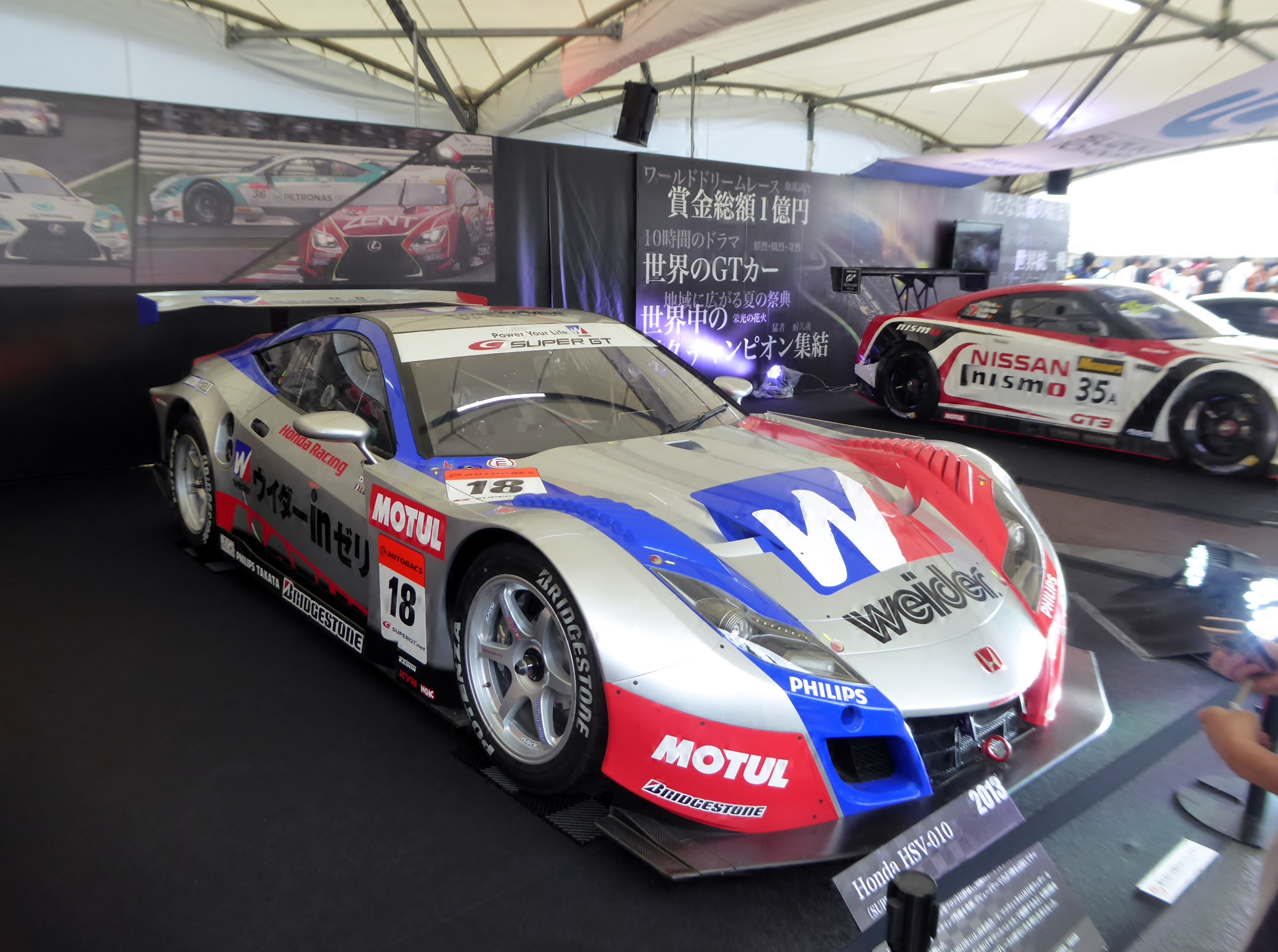 2013年スーパーGT出場の18号車ウィダーモデューロHSV-010を撮影。